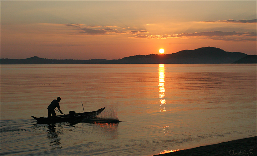 Morning in Samui